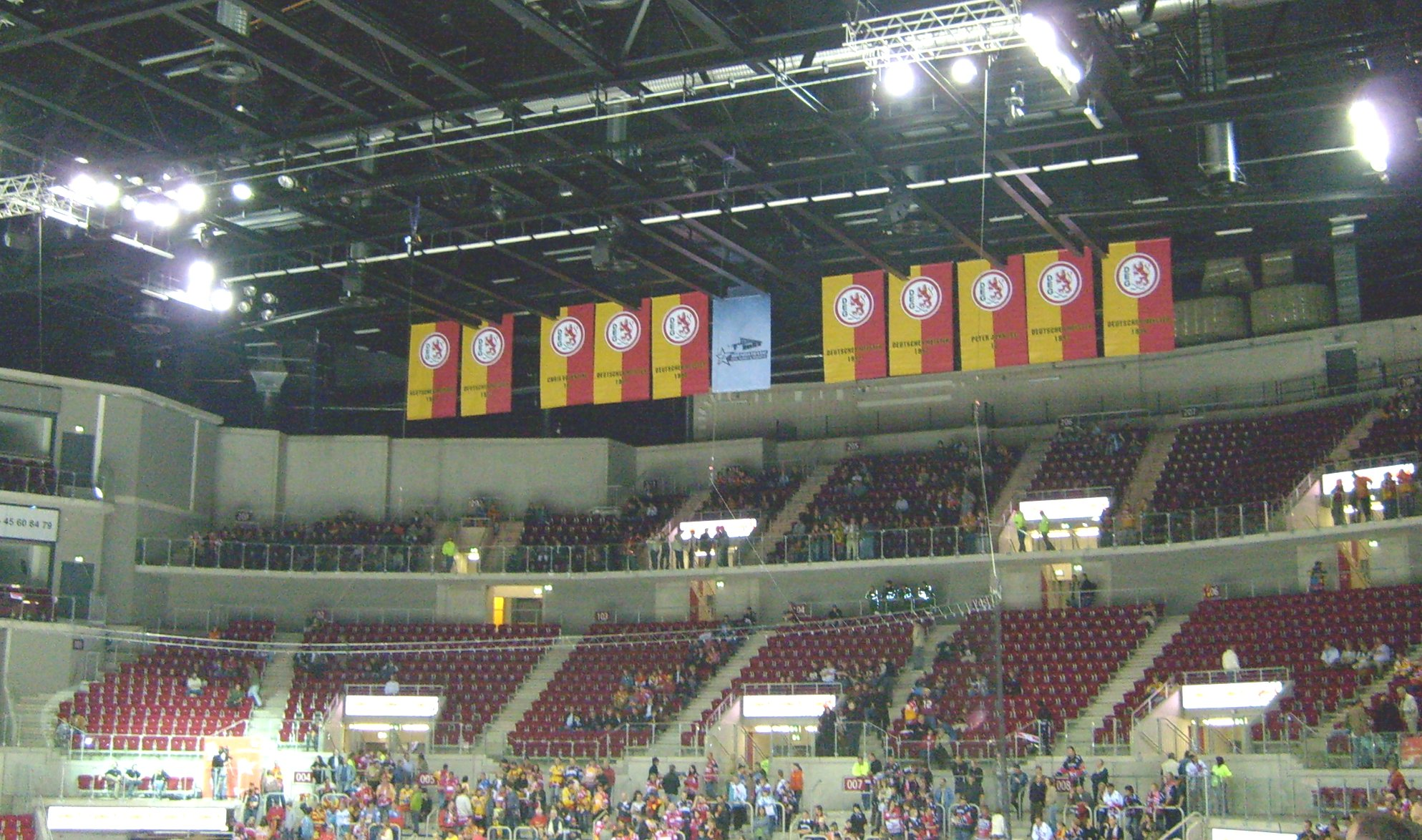 Die acht Meisterschaftsbanner und die Spielerbanner von Chris Valentine (Nr. 10) und Peter John Lee (Nr. 12) im ISS Dome